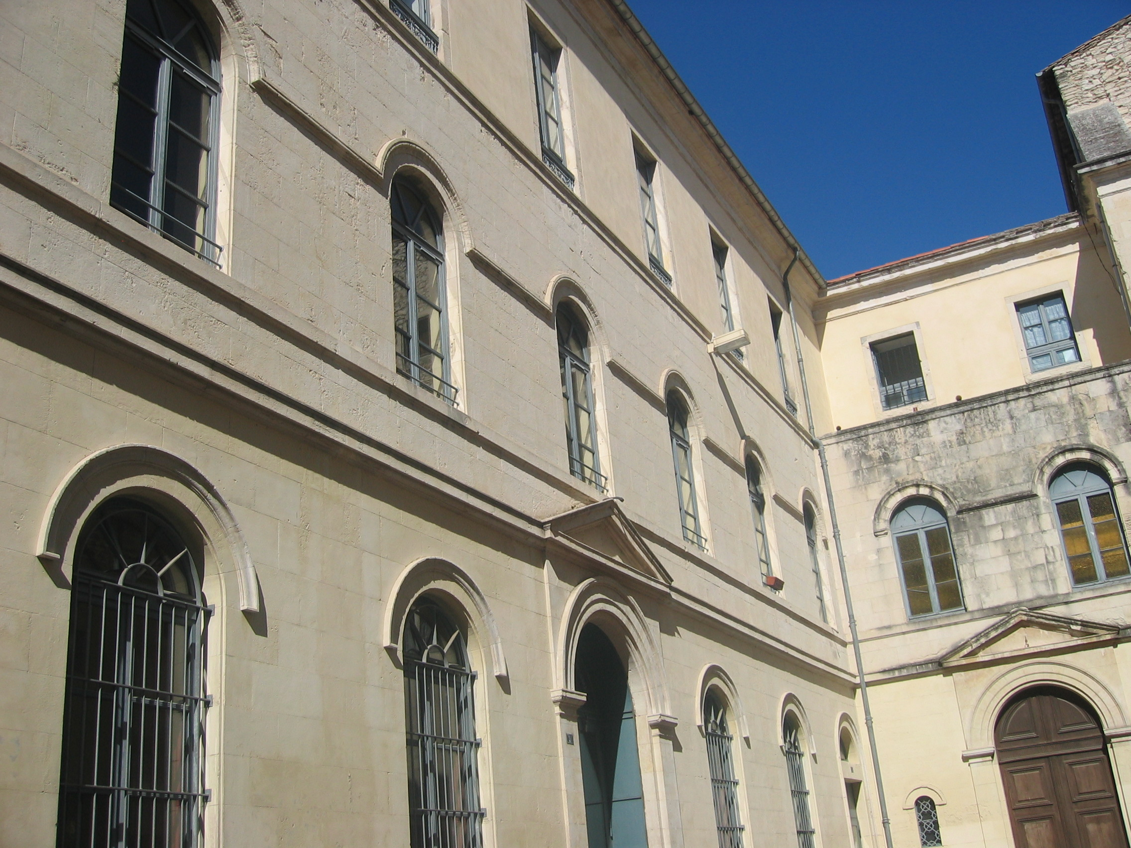 La Maison du Protestantisme, photo de Nicolas Cadène